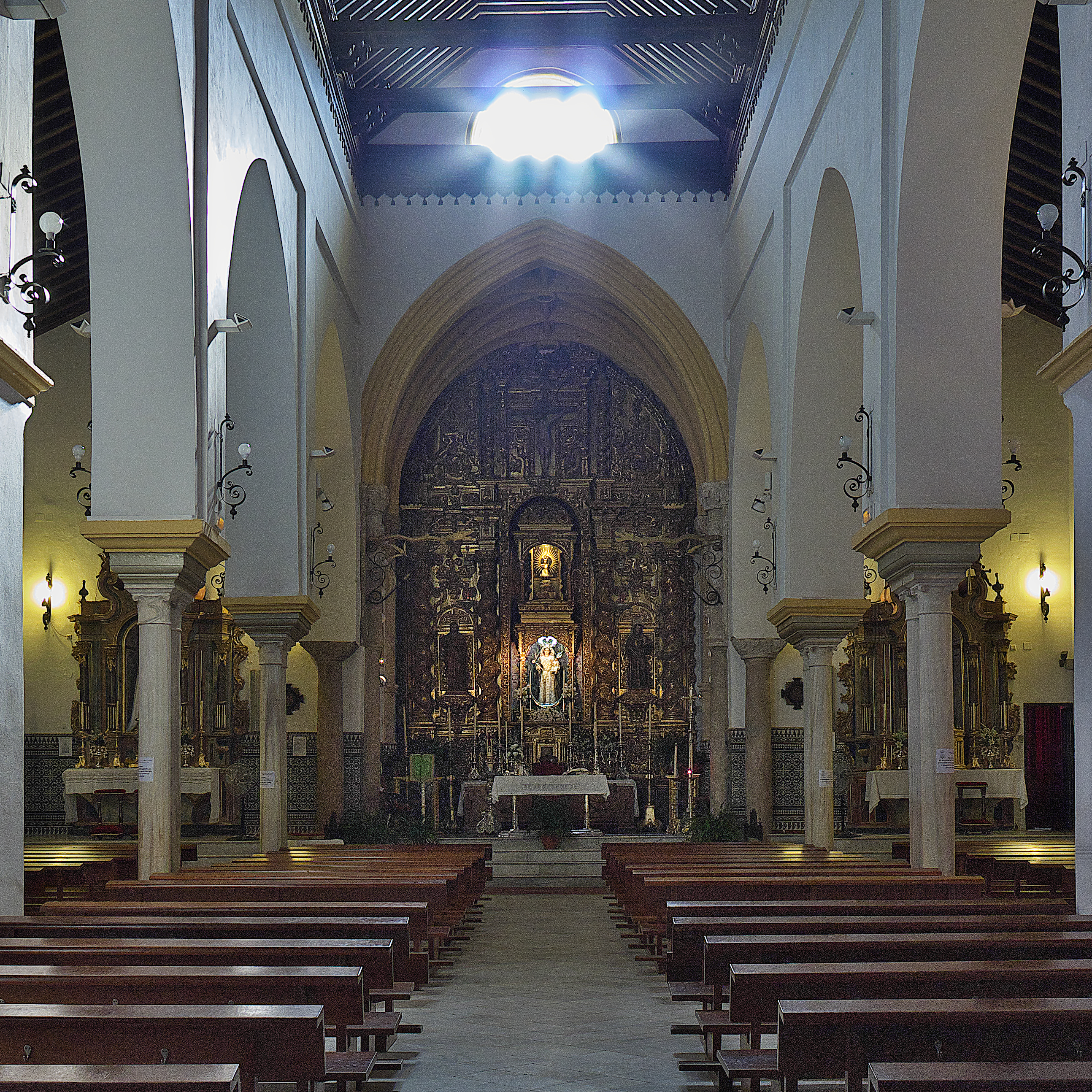 La iglesia mudéjar más importante de Sanlúcar la Mayor. Cabecera poligonal con crucería gótica.